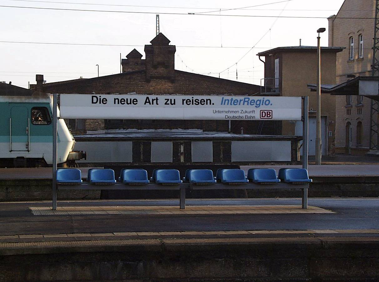 Sitzgruppe auf Bahnsteig 3/4 mit InterRegio-Werbung in Halle (Saale) Hauptbahnhof